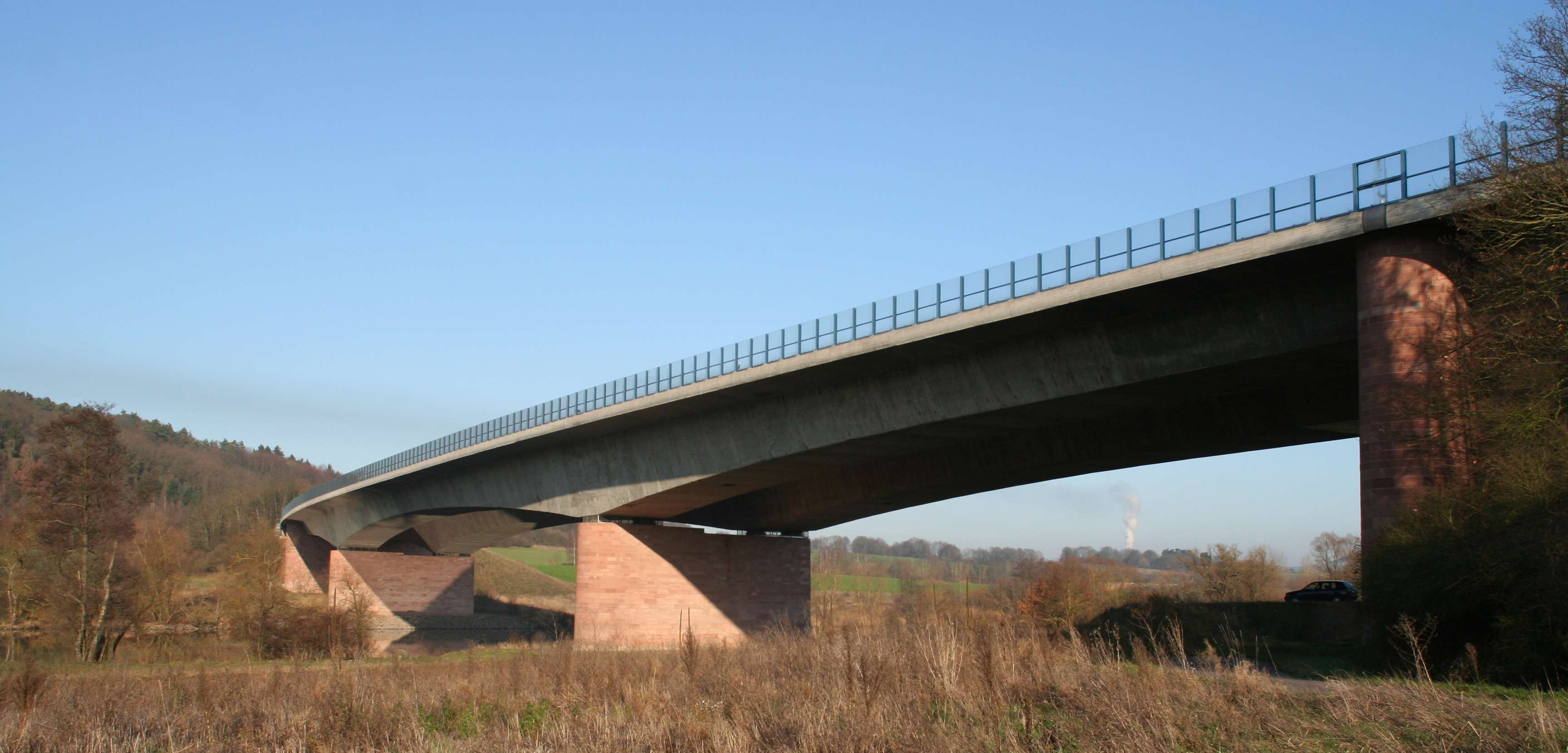 Mainbrücke Bettingen der Autobahn A3